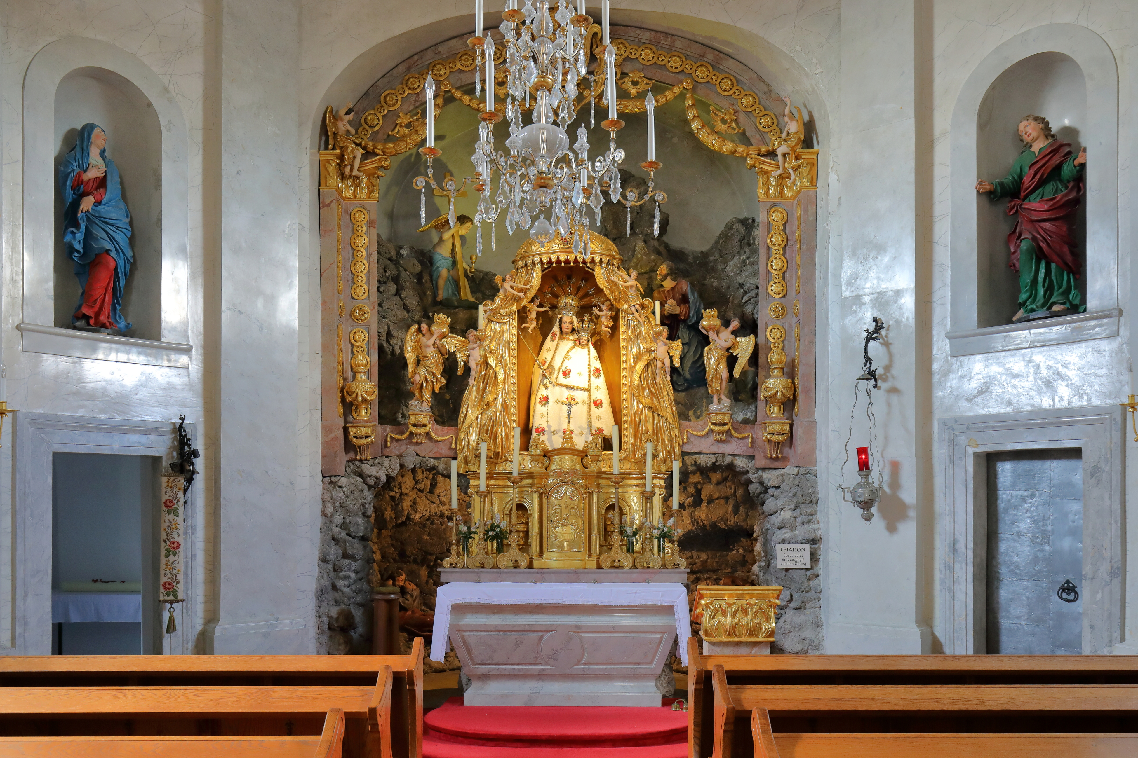 Die Gnadenkapelle und zugleich 1. Station des Kreuzweges am Kalvarienberg in der burgenländischen Landeshauptstadt Eisenstadt.Ursprünglich hieß die Gnadenkapelle Getsemani- bzw. Ölbergkapelle. 1711 ließ Fürst Paul I. die Kapelle umgestalten und ließ die Steinfigur Maria mit Kind, die im fürstlichen Badhaus im nahen Großhöflein aufgestellt war und der Bildhauer Michael Felser († 1710) schuf, in die Kapelle übertragen.